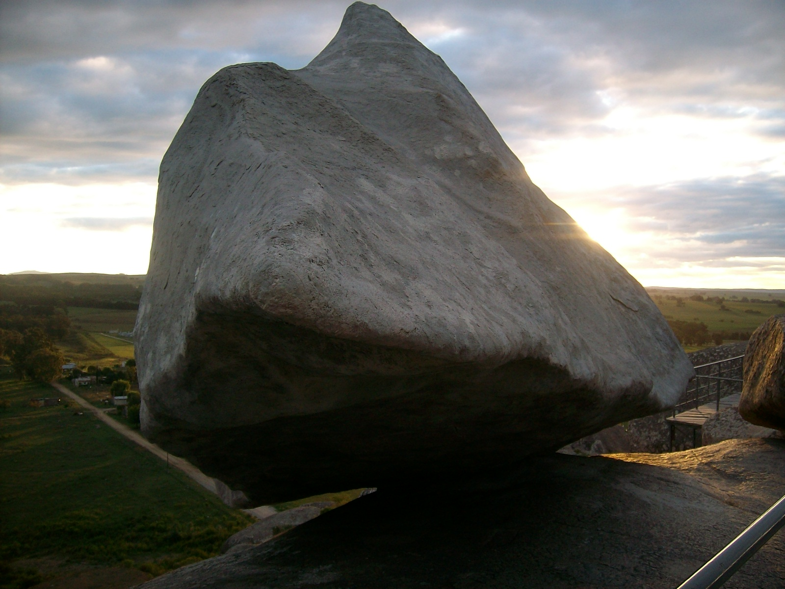 Réplica de la roca movediza original, caida en 1912. Dicha replica colocada en 2007, se encuentra en el Parque Lítico La Movediza de Tandil.